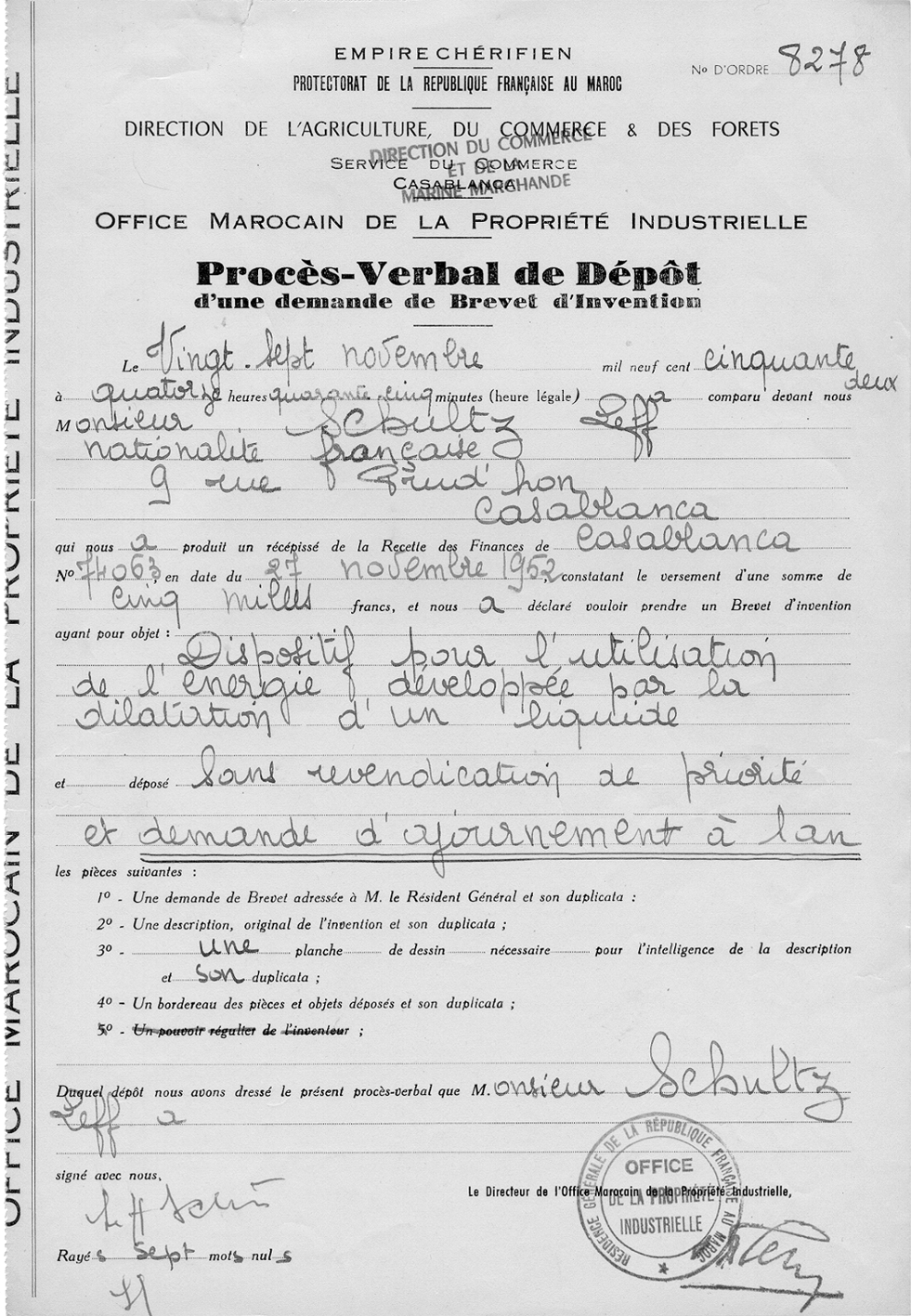 Депозитный протокол, подтверждающий авторство: Л.А.Шульц. “Устройство для утилизации энергии, развивающейся в результате расширения жидкости”. Касабланка.